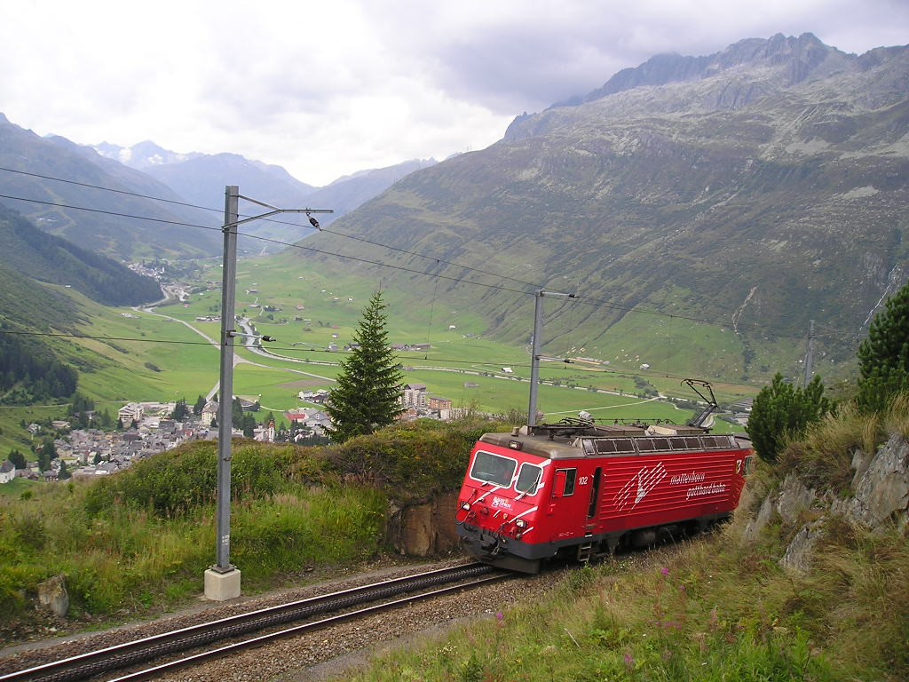 vlak na ozubnici směr stanice Nätschen